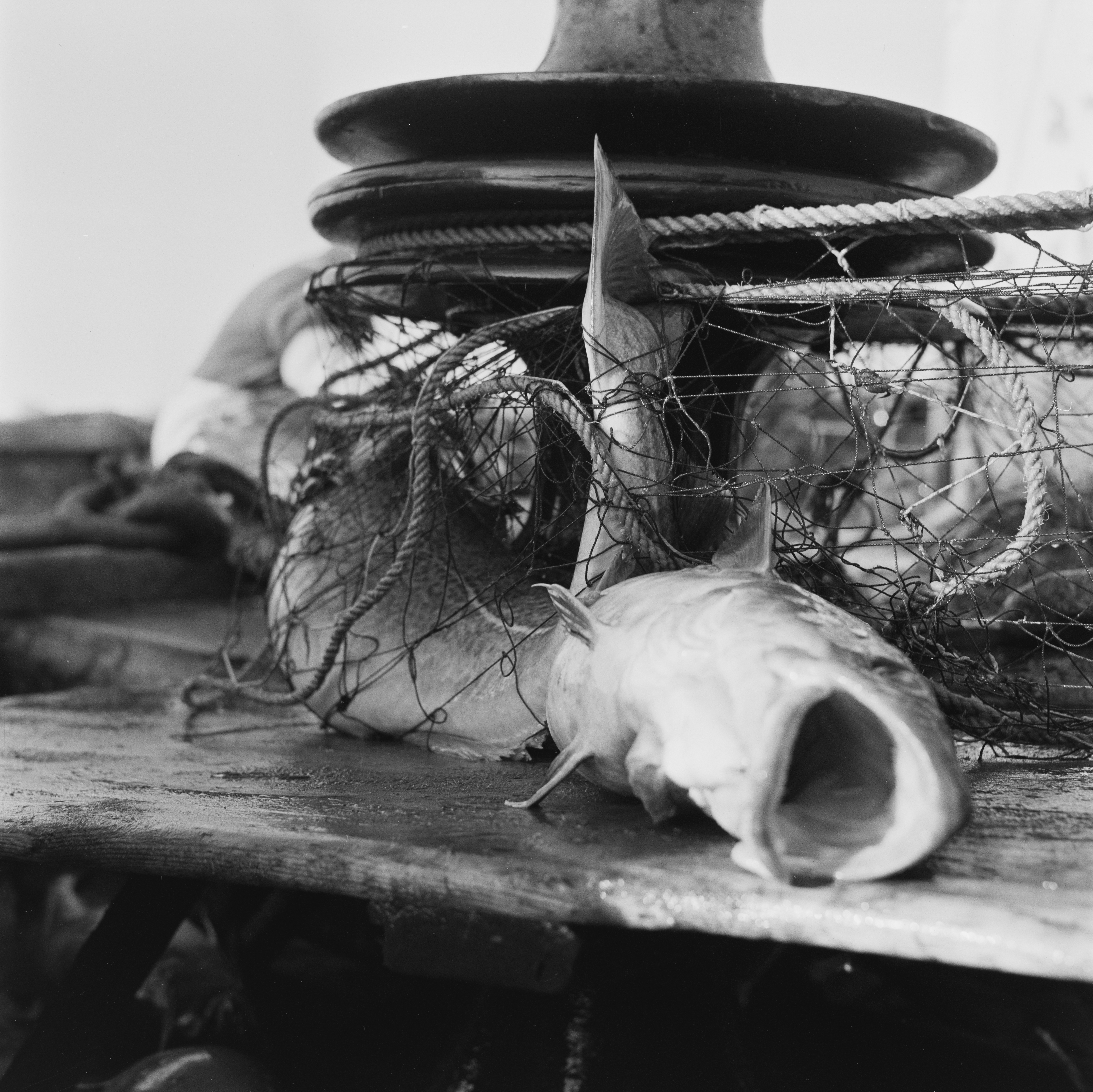 Bildet er hentet fra Arkivverket. Vårfiske på Vardø Arkivinstitusjon : Riksarkivet Arkivnavn : Billedbladet NÅ Sted : Norge, Finnmark, Vardø, Vardø Emneord: Industri, Arbeid, Fiskeindustri Avbildet